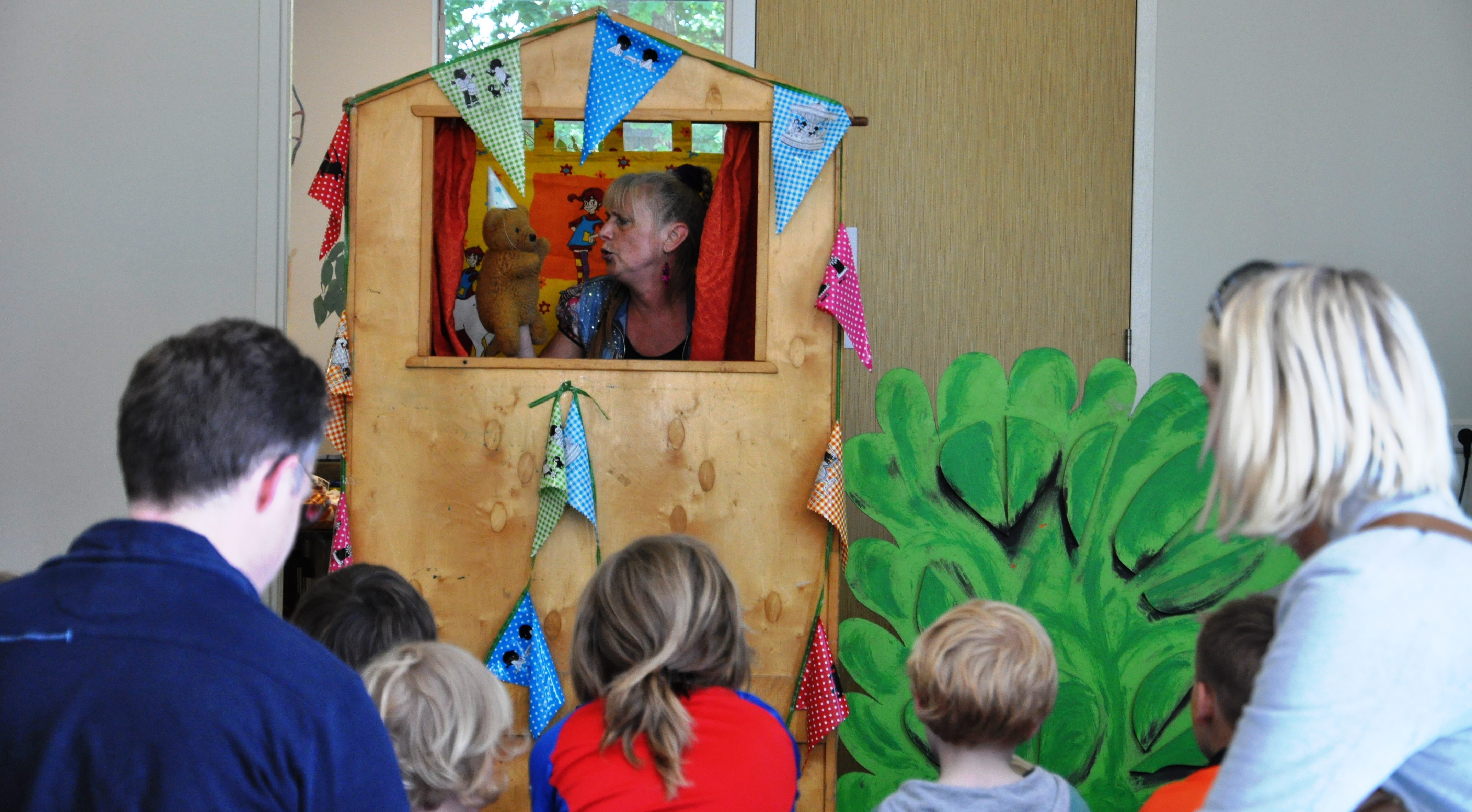 Poppenkastvoorstelling tijdens de opening van het kinderopvanggebouw van de Werkplaats Kindergemeenschap in Bilthoven.